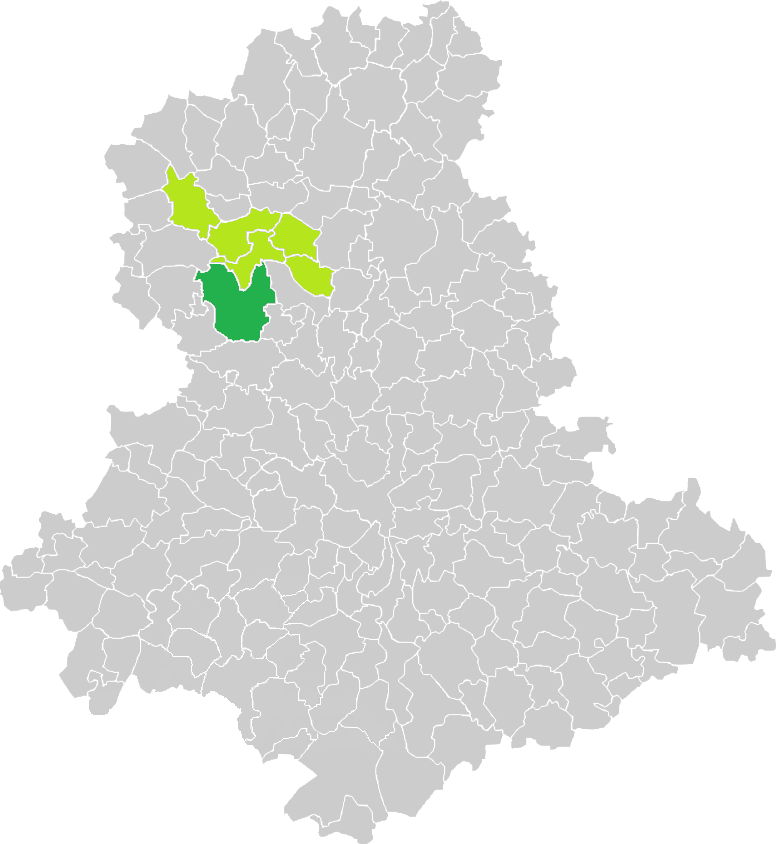 Carte de situation de la commune de Blond (en vert foncé) dans le votre Canton (en vert clair) sur une carte des communes de la Haute-Vienne